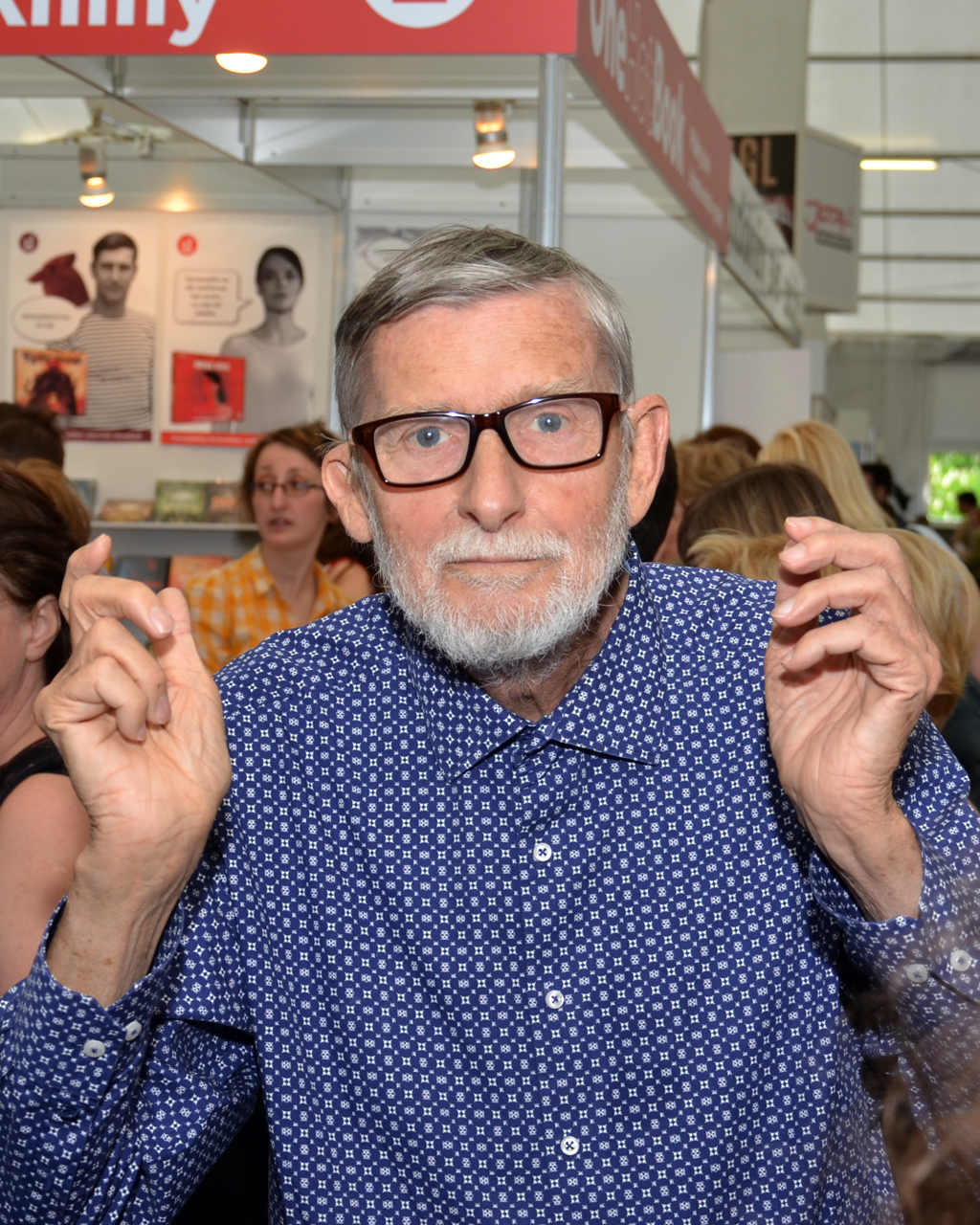 Jan Schmid (2017)